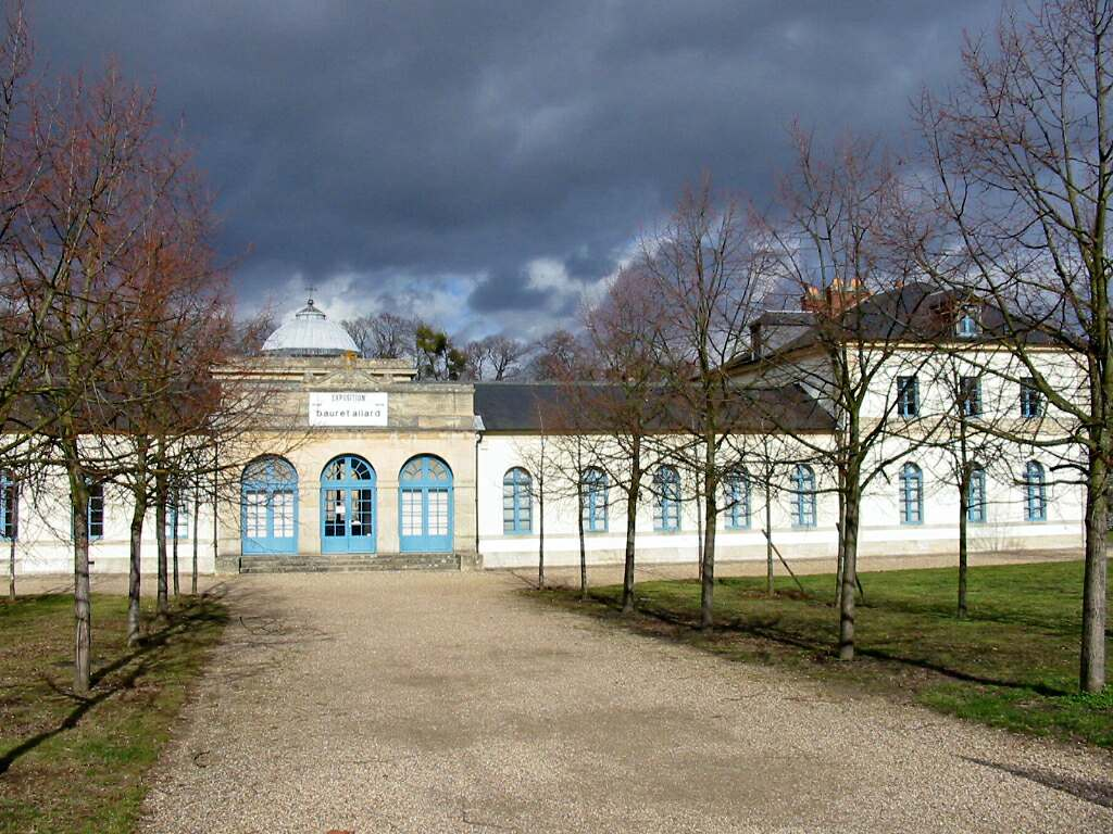 Hospice Saint-Charles à Rosny-sur-Seine - Yvelines (France)